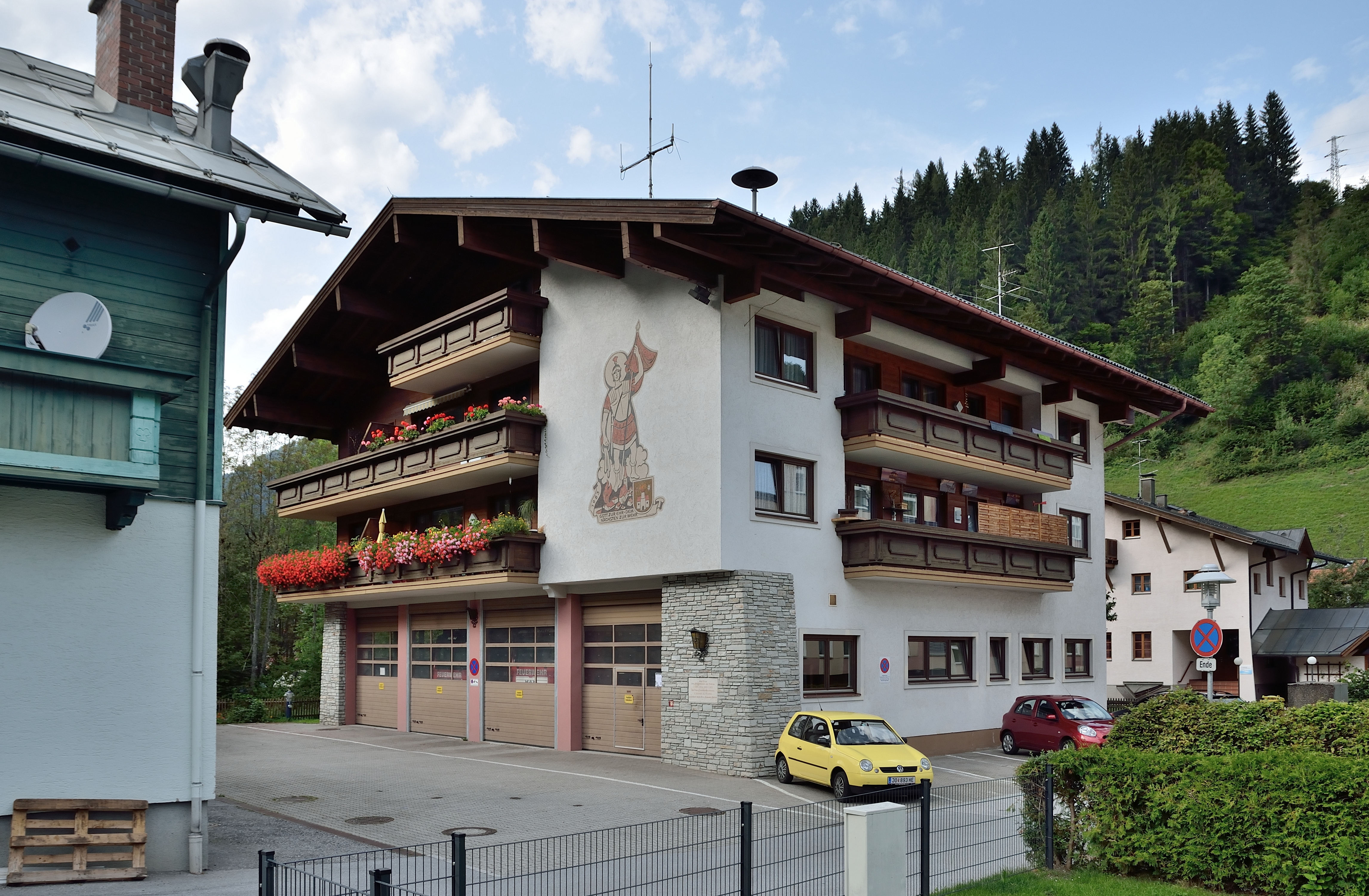 Das Rüsthaus der FF Hüttau ist auch ein Wohnhaus in den obenliegenden Geschoßen, Hüttau, Salzburg.